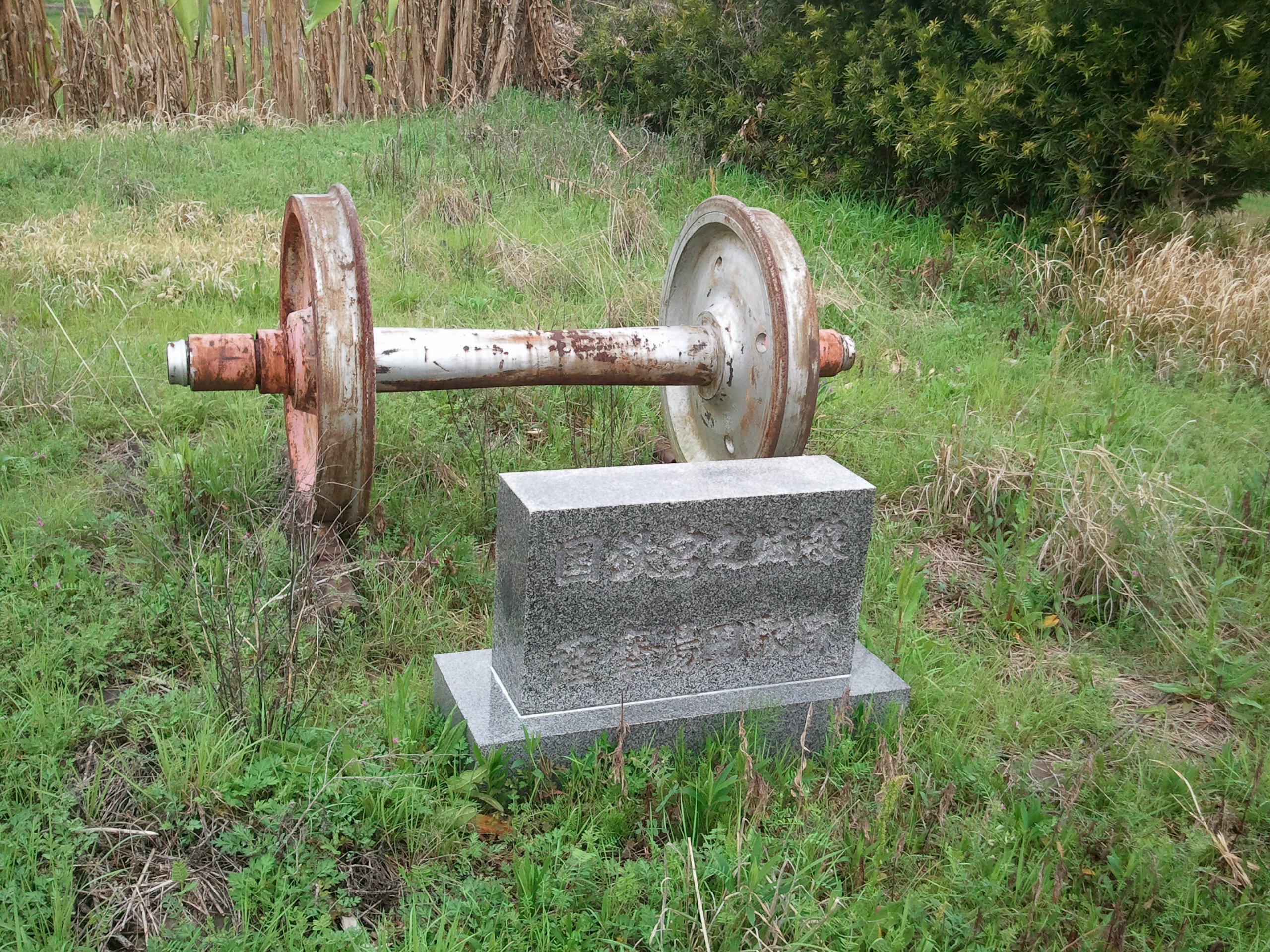 薩摩湯田駅跡